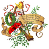 Das Wappenschild der Akademisch Musikalischen Verbindung